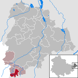 Jonaswalde in Thuringia - District Altenburger Land